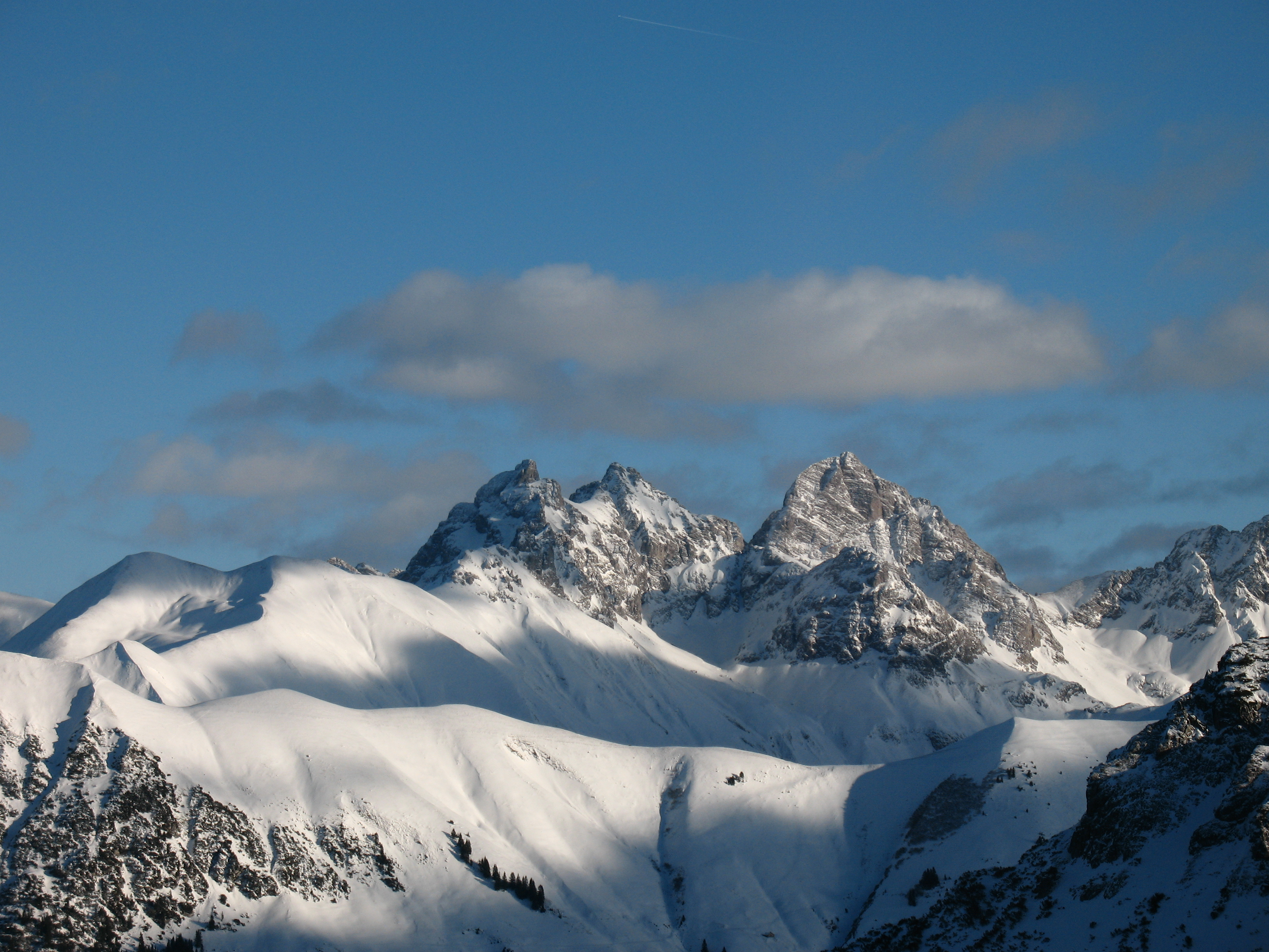 Blick aus dem Skigebiet Fellhorn zum höchsten Gipfel der Allgäuer Alpen dem Großen Krottenkopf (2656 m), links davon Öfnerspitze (2576 m), Krottenspitze (2551 m) und Fürschießer (2271 m).